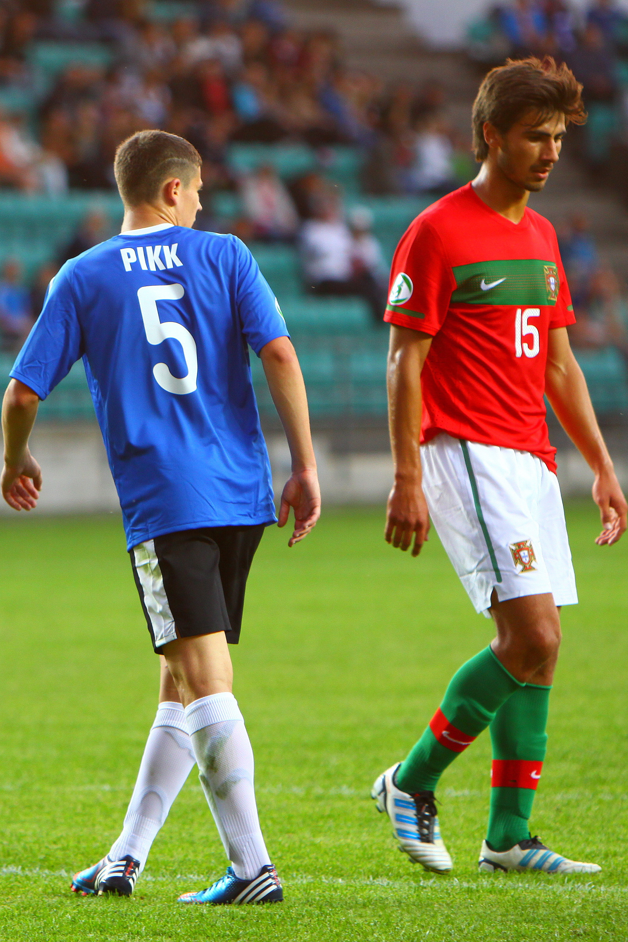 U-19 Estonia vs Portugal.